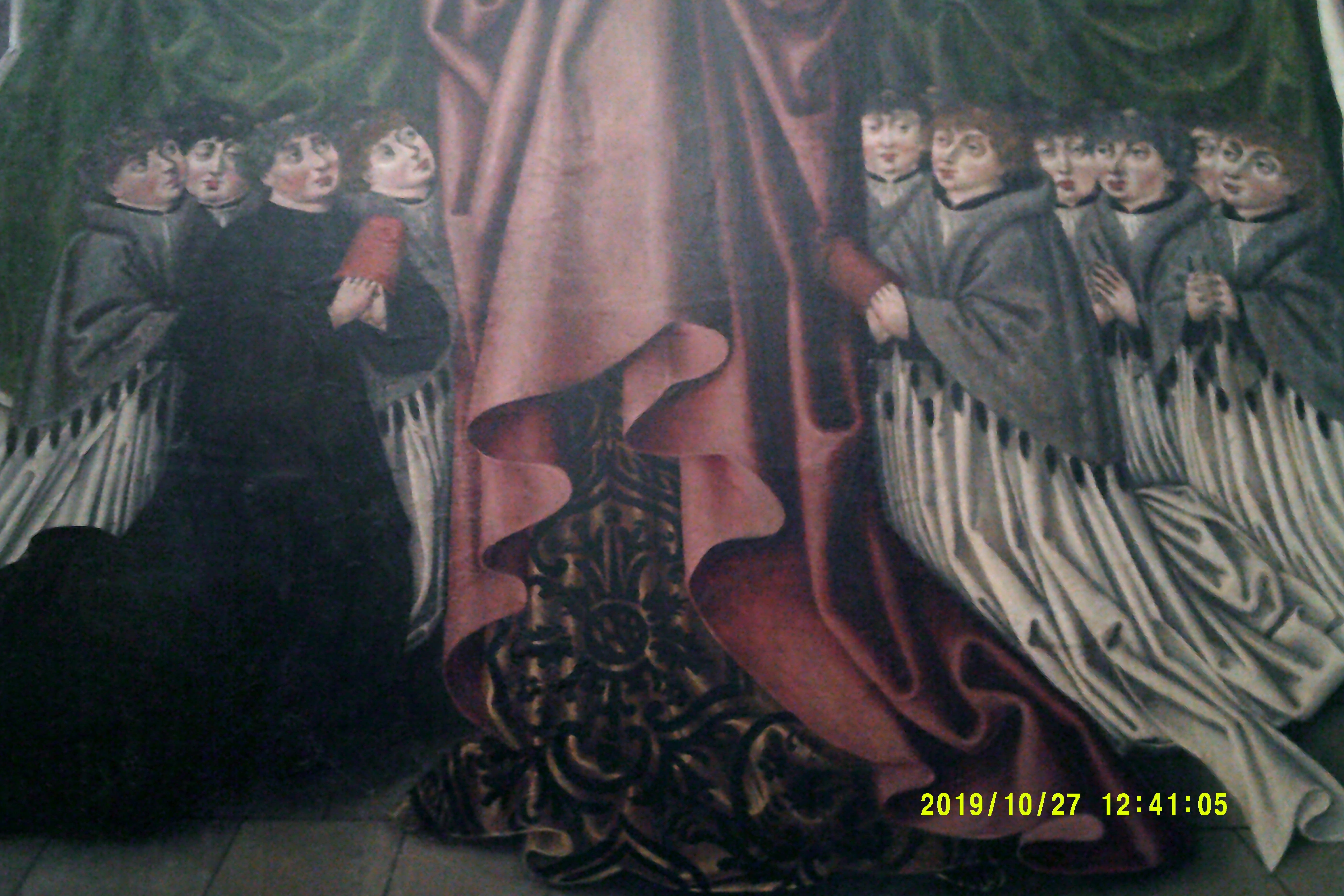 Feuchtwangen Stiftskirche, Marienaltar Rückseite untere Hälfte, Augustiner Chorherren mit Probst. Schutzmantelmadonna mit zwei Engeln als Mantelhalter. Aufgrund der extrem engen Platzverhätnisse ist ein gutes Gesamtbild kaum möglich.